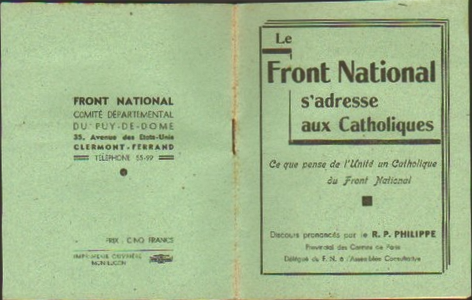 Brochure, Le Front national s'adresse aux catholique, par le R.P. Philippe, frontispice, 1946 ?